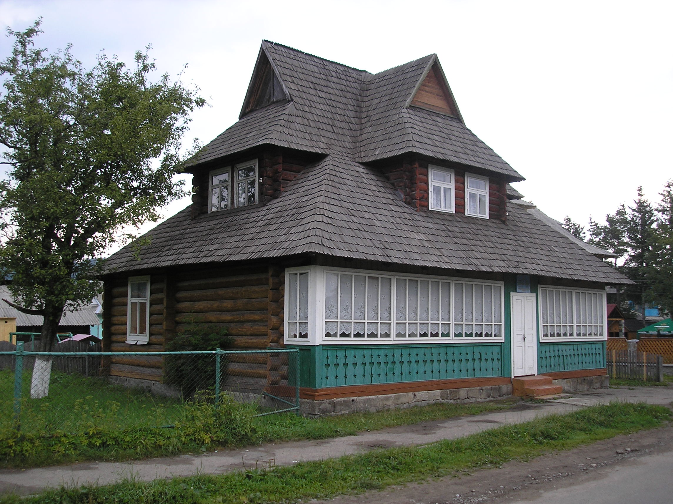 Будинок у с.Космач